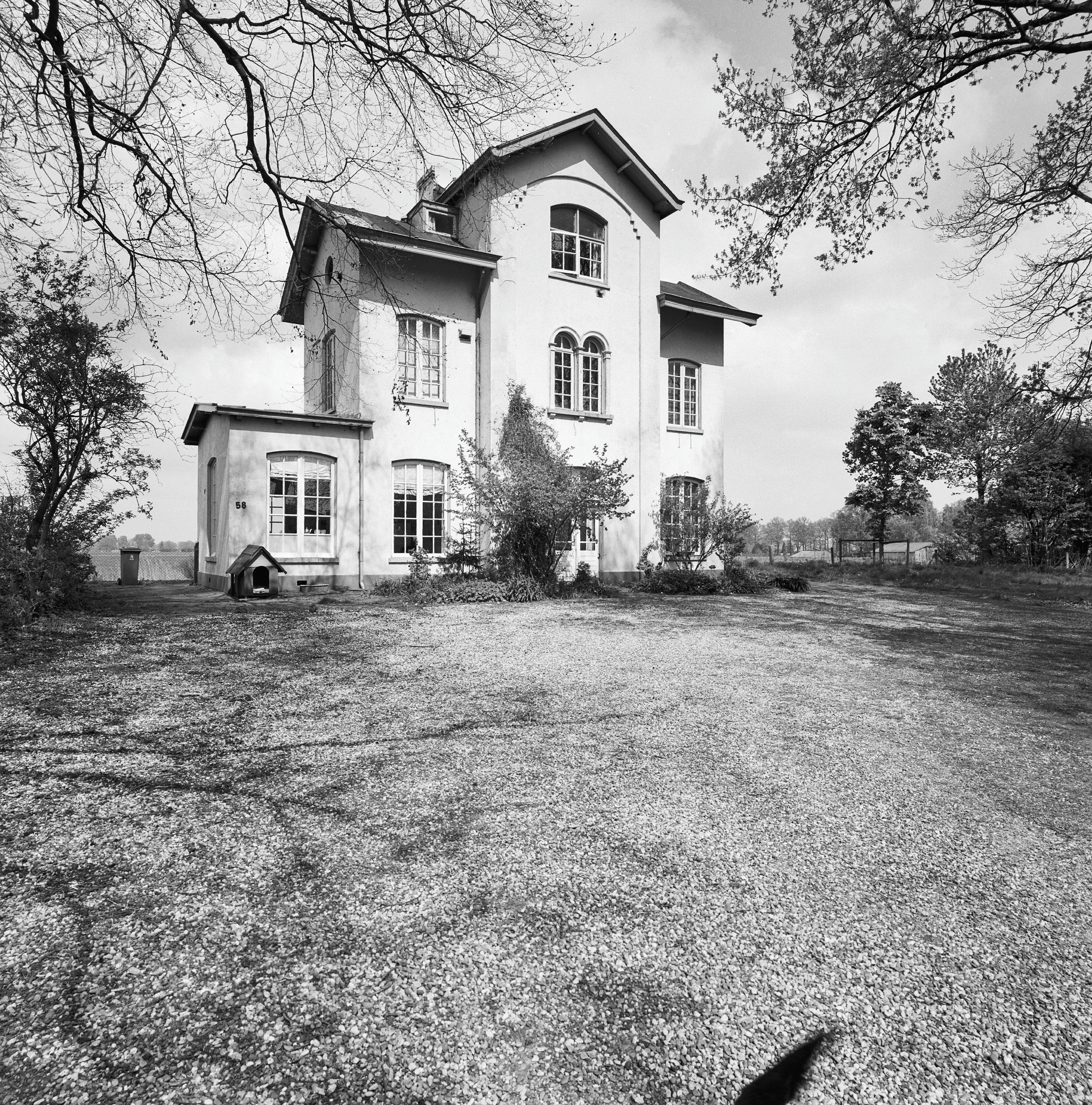 Voormalig Station Laren-Almen: Overzicht voorgevel en rechter zijgevel (opmerking: Gefotografeerd voor Monumenten In Nederland Gelderland)